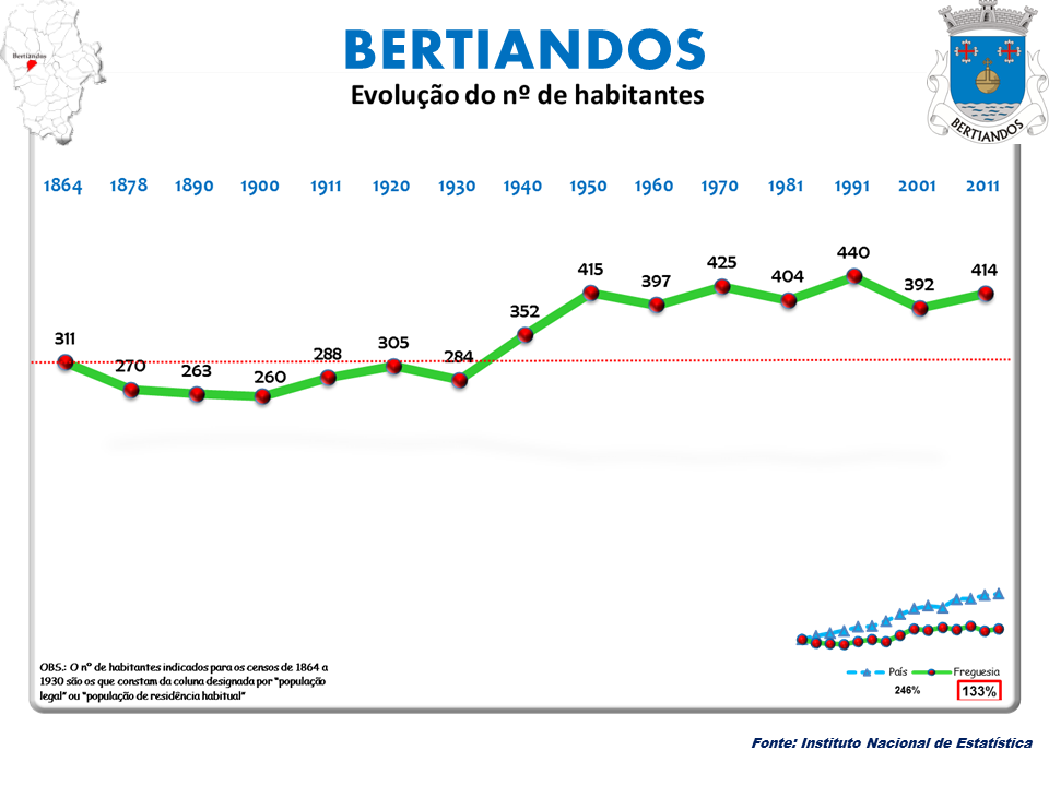 Censos 1864/2011